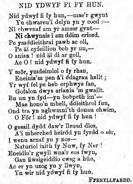 Cerdd gan William Morgan Williams 1831-1877 o Llais y Wlad 30 Hydref 1874 trwy gasgliad Papurau Newyddion LlGC